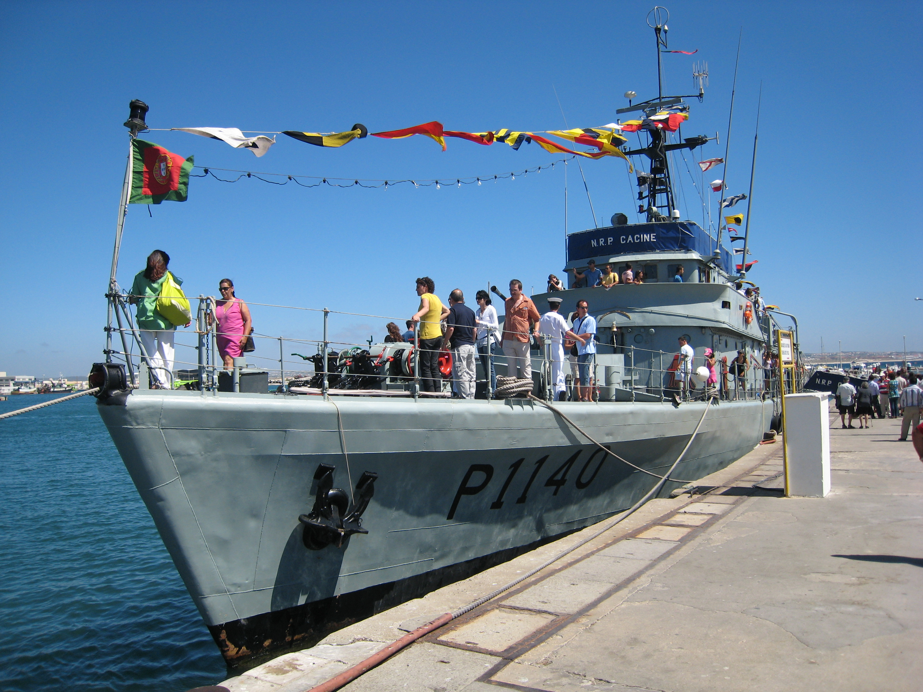 NRP Cacine (P1140) fundeado na marina de Peniche.